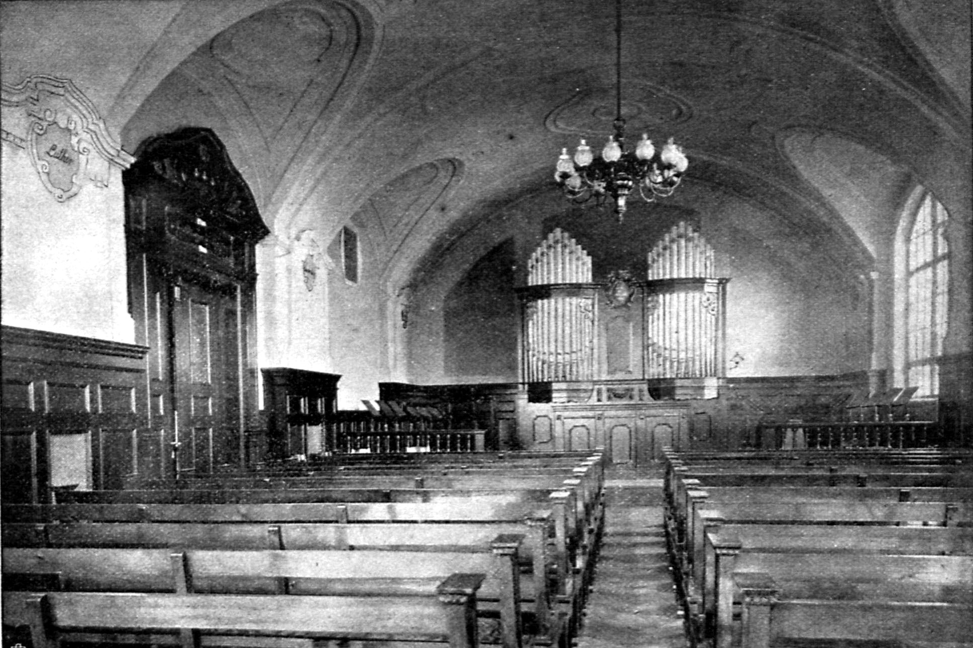 Aula des Lehrerseminars in Lübeck